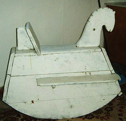 Schaukelpferd (um 1900) , angefrtigt für einfache (bäuerliche) Kinder